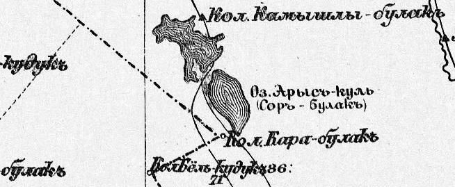 Озеро Арысъ-куль на Военно-дорожной карте Азиатской России составленной Картографическим отделением Военно-Топографического Управления в 1895 году. Масштаб 1:2100000